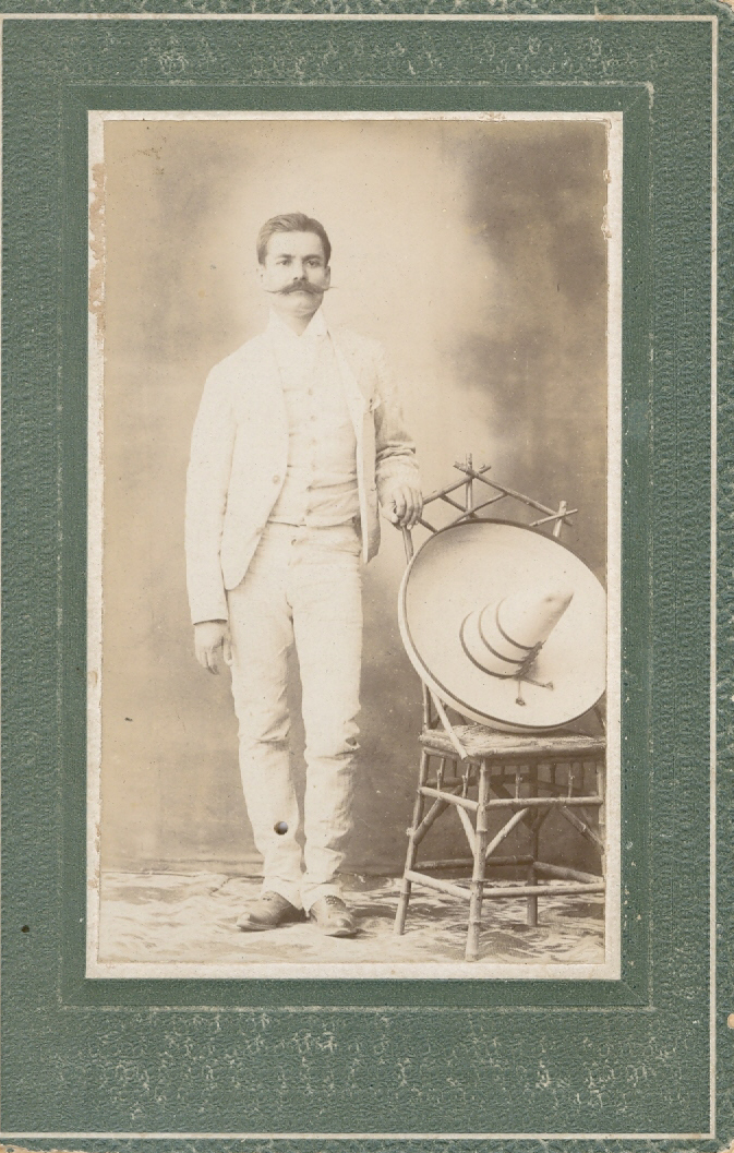 Capitan Isidro Michel Lopez, jefe revolucionario de la zona del sur de Jalisco.